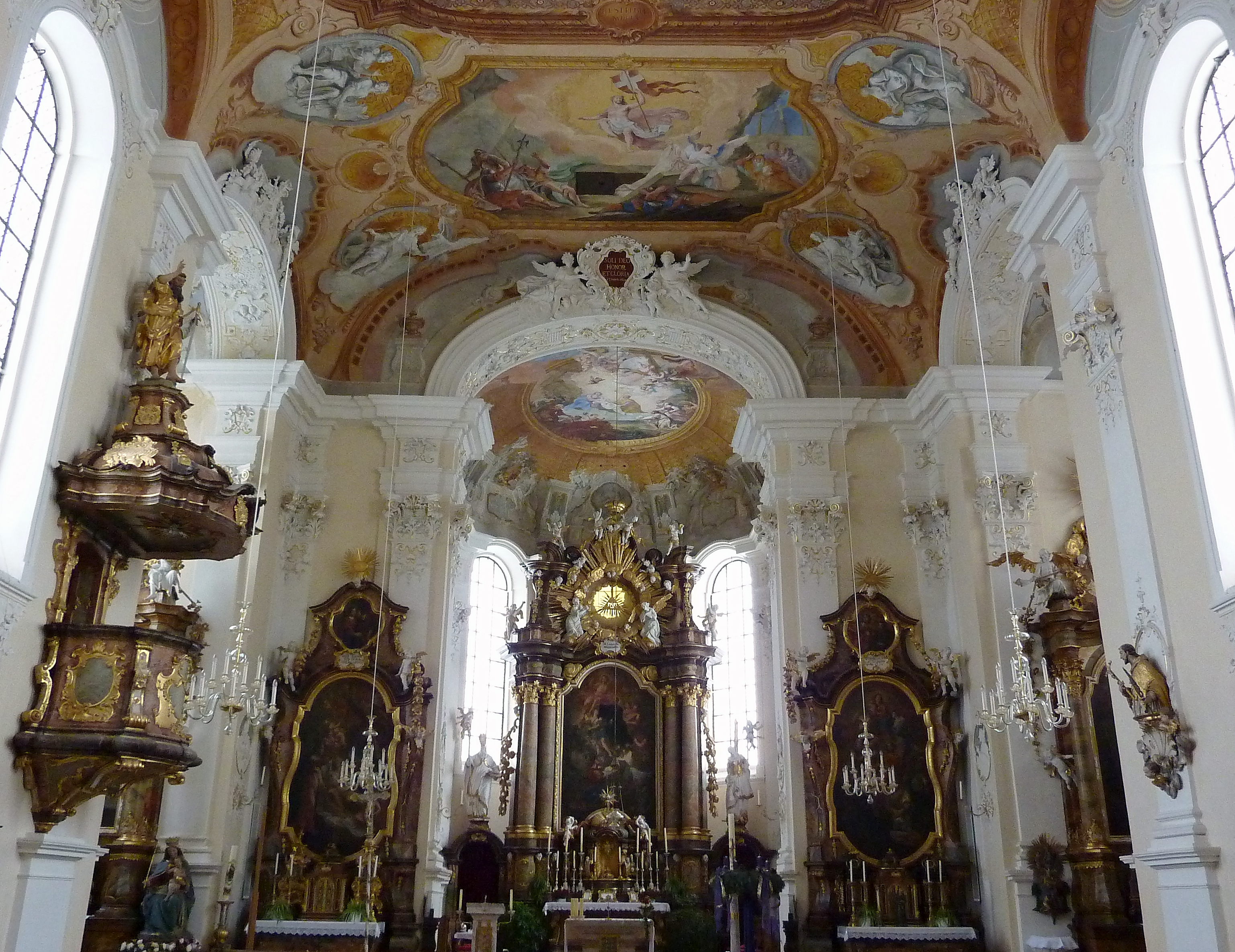 Katholische Pfarrkirche, ehemalige Kloster- und Wallfahrtskirchellfahrtskirche St. Leonhard in Unterliezheim, einem Ortsteil von Lutzingen im Landkreis Dillingen an der Donau (Bayern), Innenraum mit Blick zum Chor